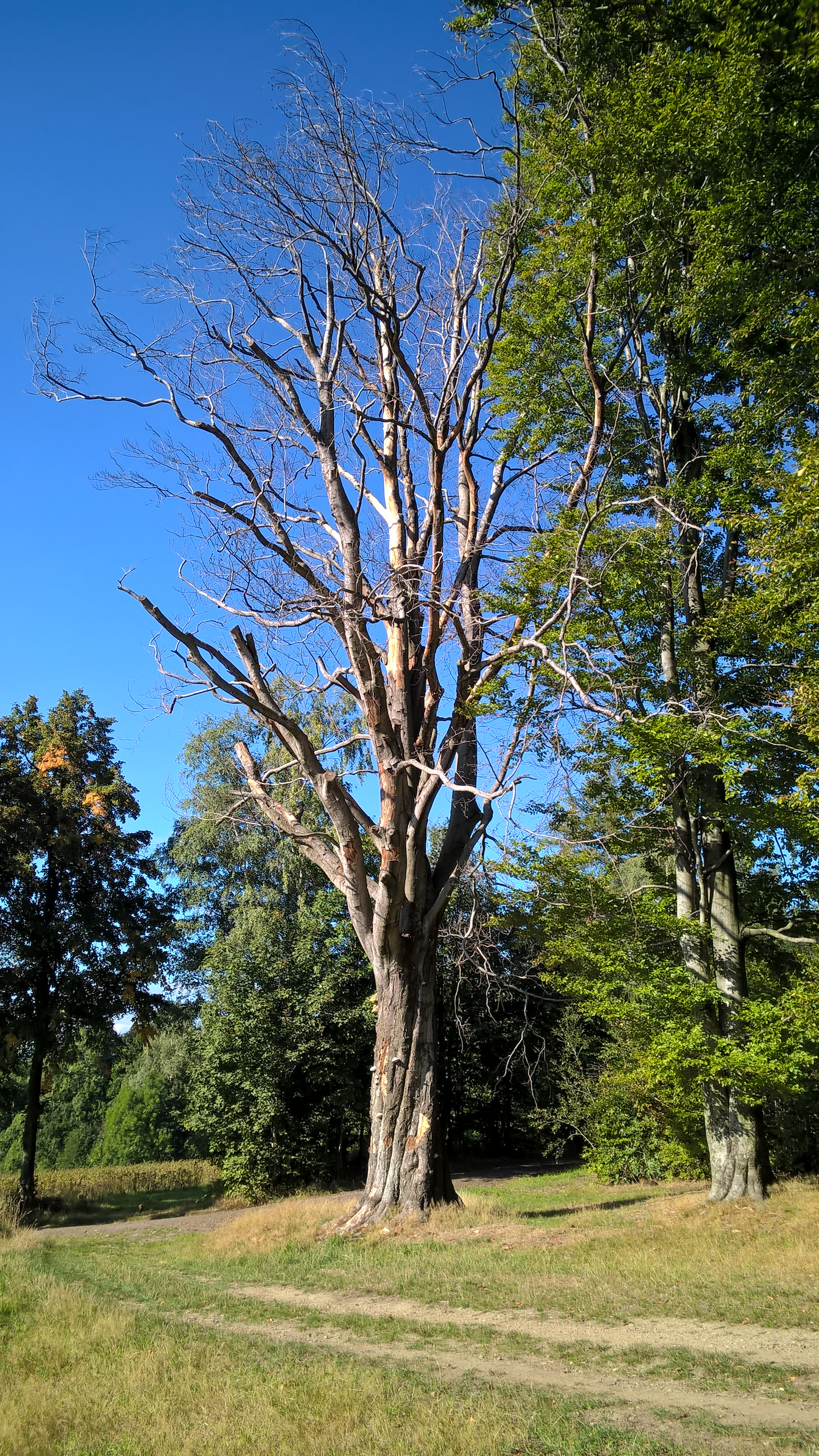 Nové Město pod Smrkem - památný buk lesní na okraji lesa u zeleně značené turistické stezky do Jindřichovic p. S., asi 1 km severovýchodně od náměstí